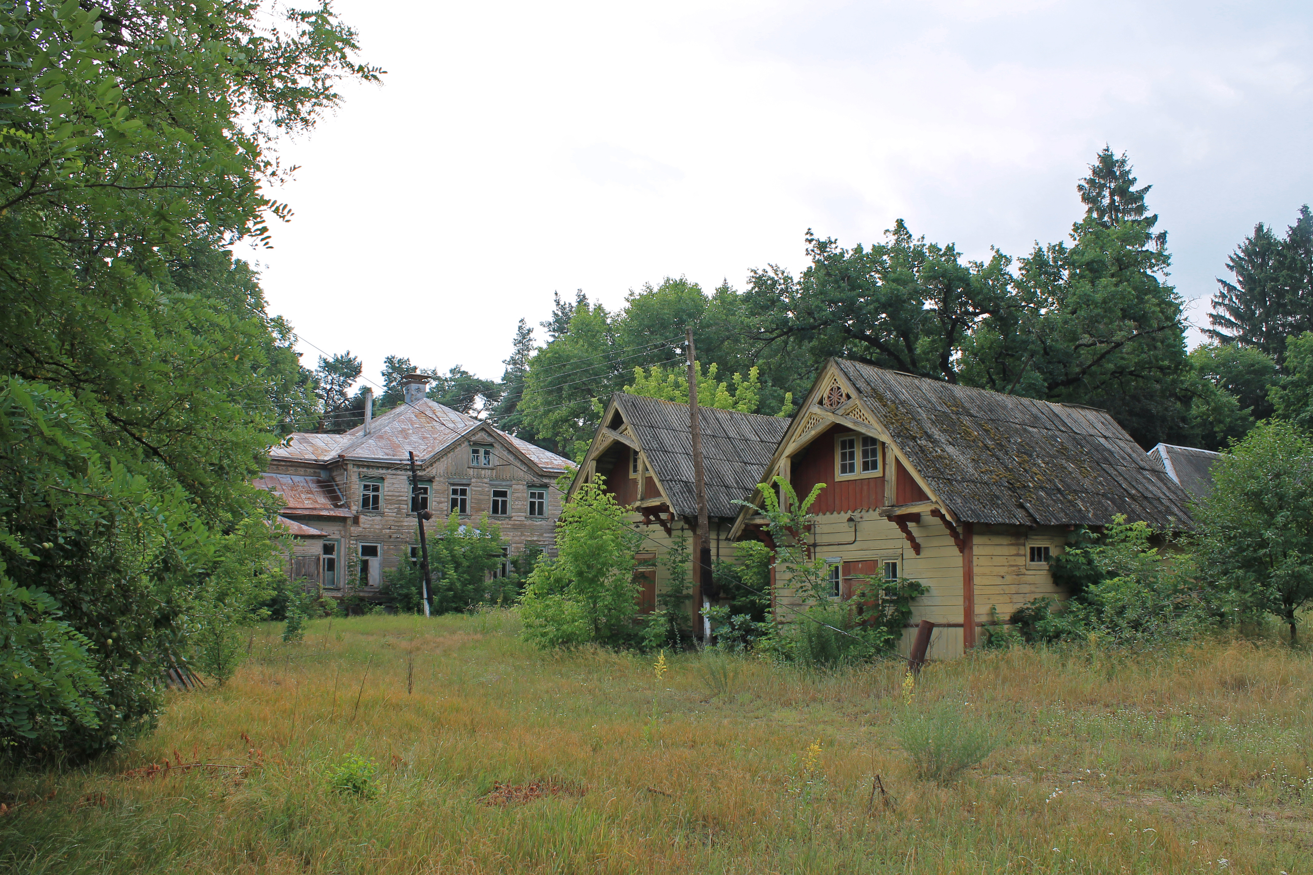 Будівлі кінця 19ст. колишньої лікарні для робітників цукрового заводу Харитоненка поблизу с.Мурафа, на території національного природного парку "Слобожанський", Краснокутський р-н., Харківська обл.